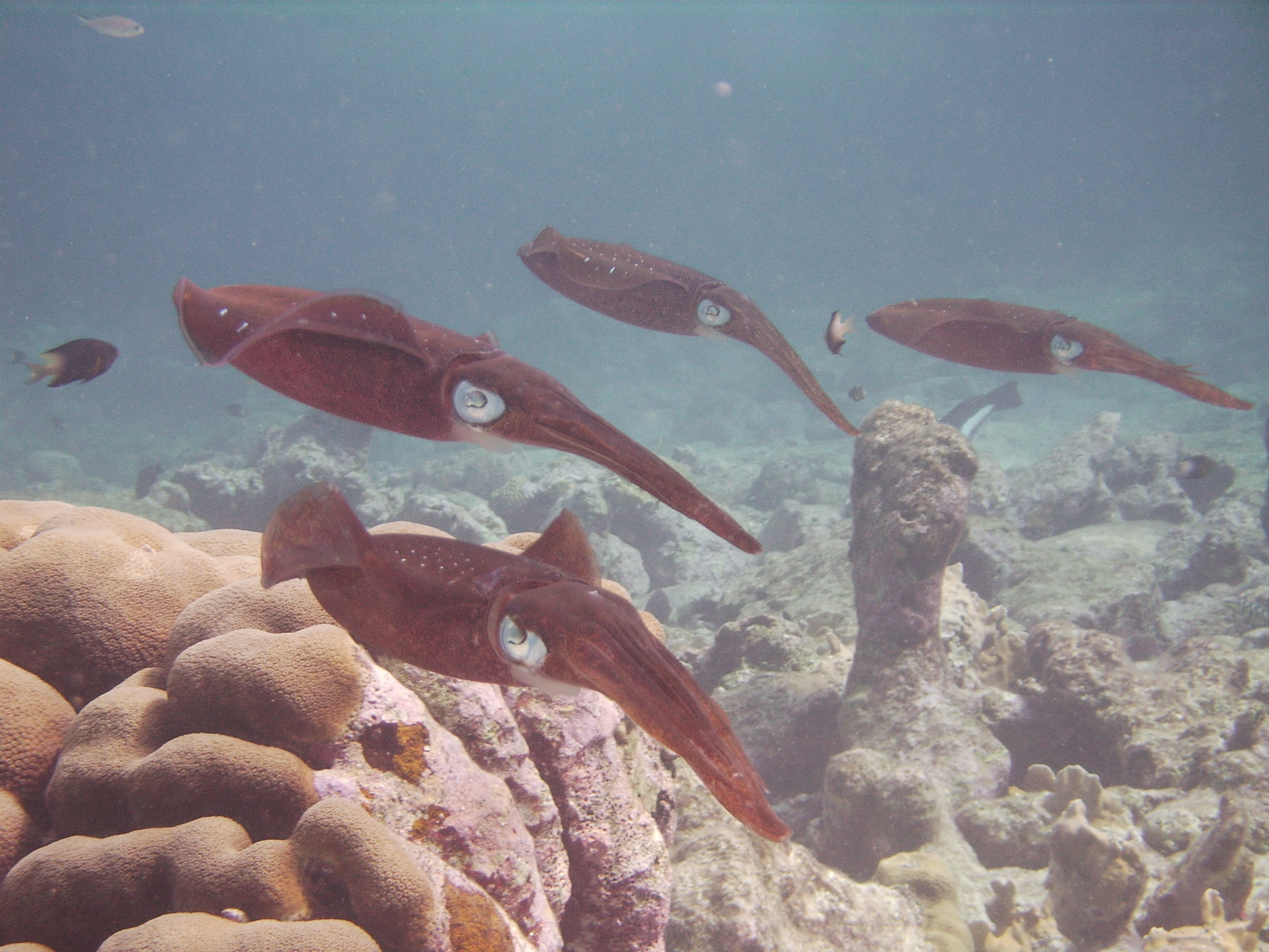 Gruppe Riffkalamare